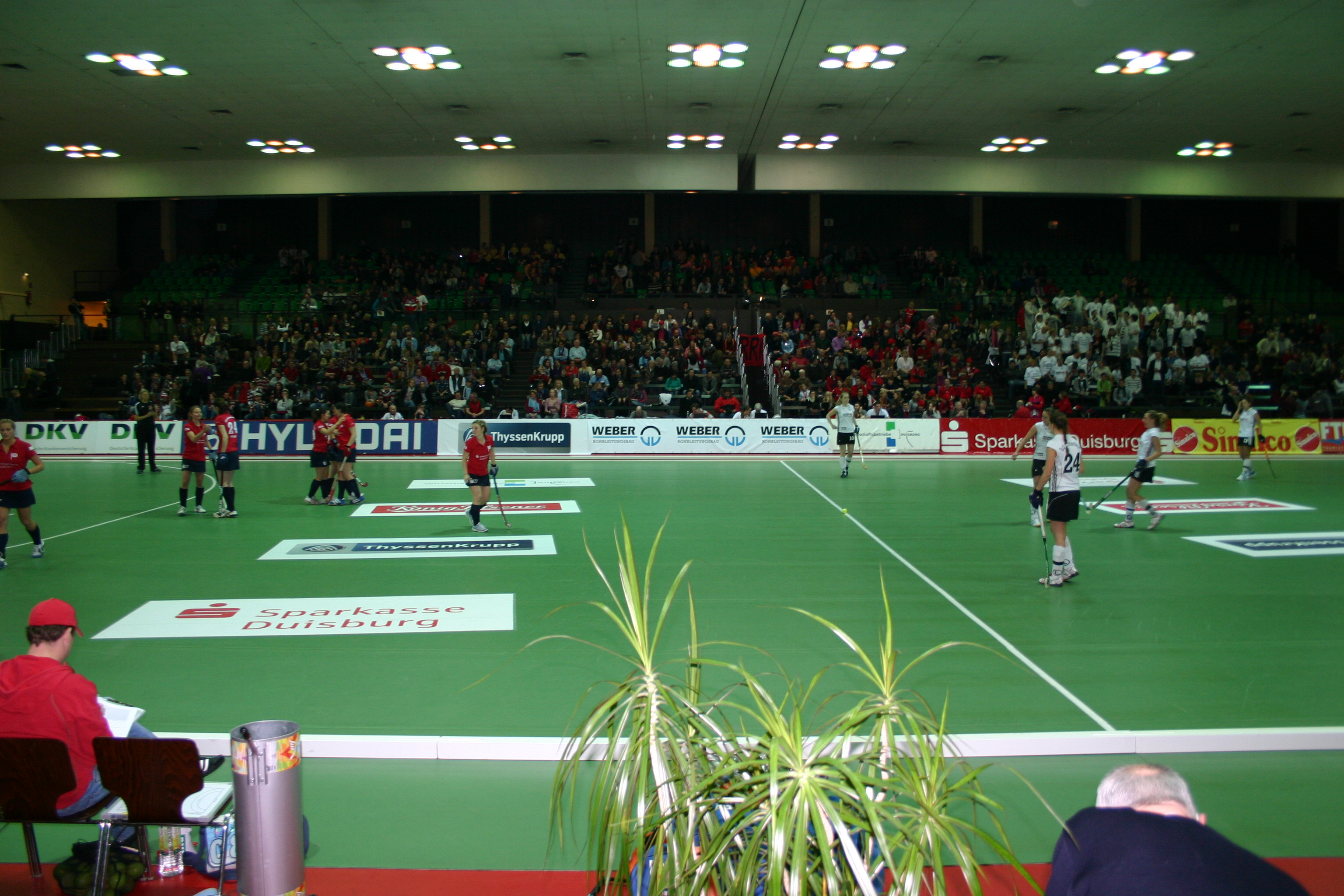 50. Deutsche Hallenhockey-Meisterschaften. Halbfinalspiel der Damen in der Duisburger Rhein-Ruhr-Halle. (Originalfoto, unbearbeitet; fotografiert von BlackIceNRW.)